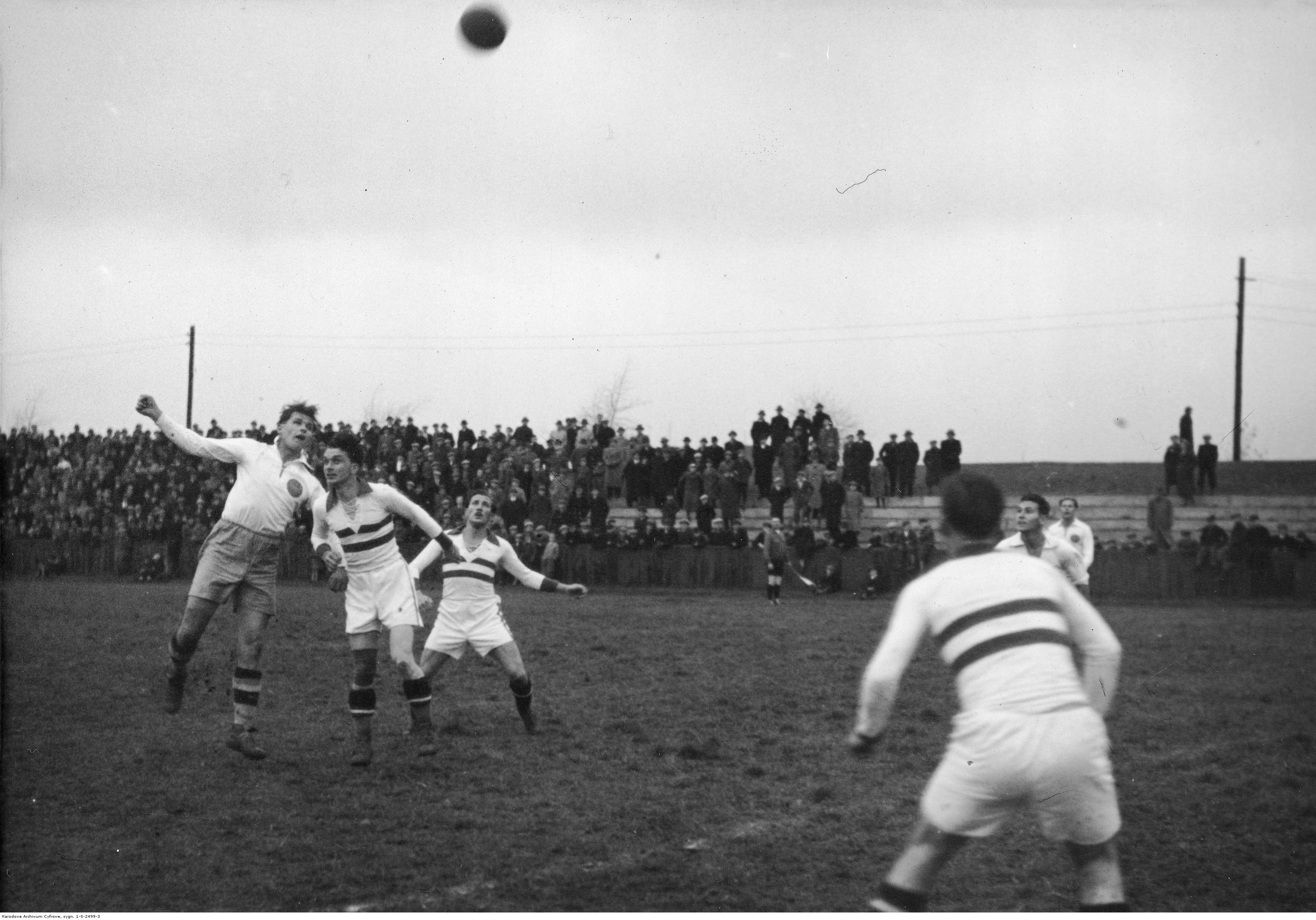 Mecz piłki nożnej Śląsk Górny - Śląsk Zaolziański w Katowicach. Teodor Peterek główkuje.